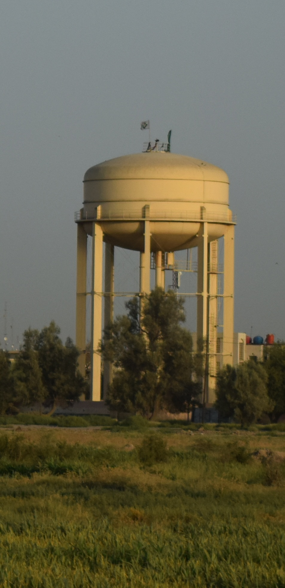 خزان مياه في الحلة، بابل، العراق.